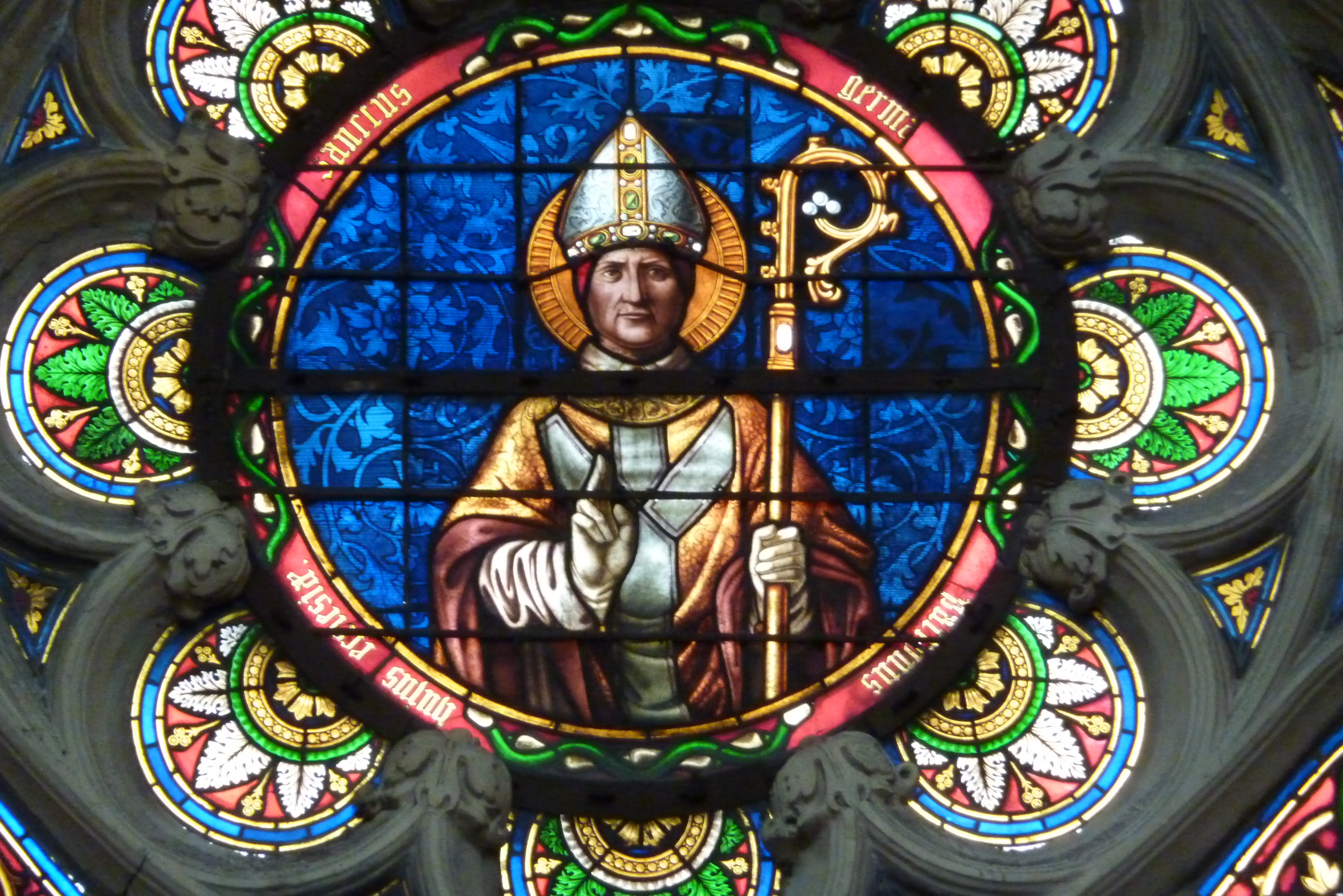 Bleiglasfenster in der katholischen Kirche Saint-Germain-l'Auxerrois in Paris, Darstellung: Germanus von Auxerre